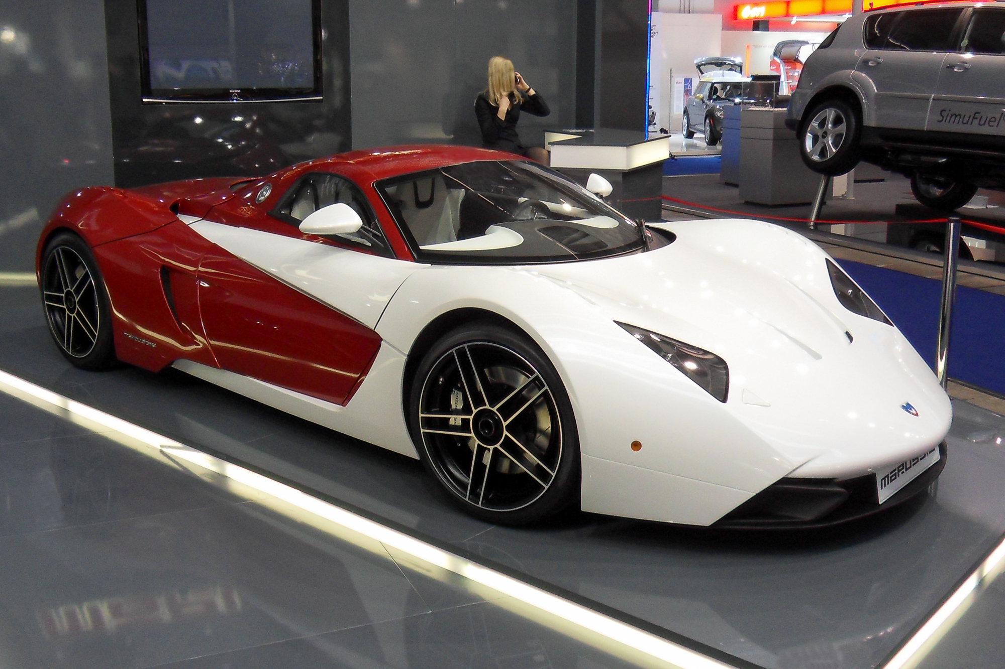 Ein Marussia B1 auf der Internationalen Automobilausstellung 2009 in Frankfurt am Main.